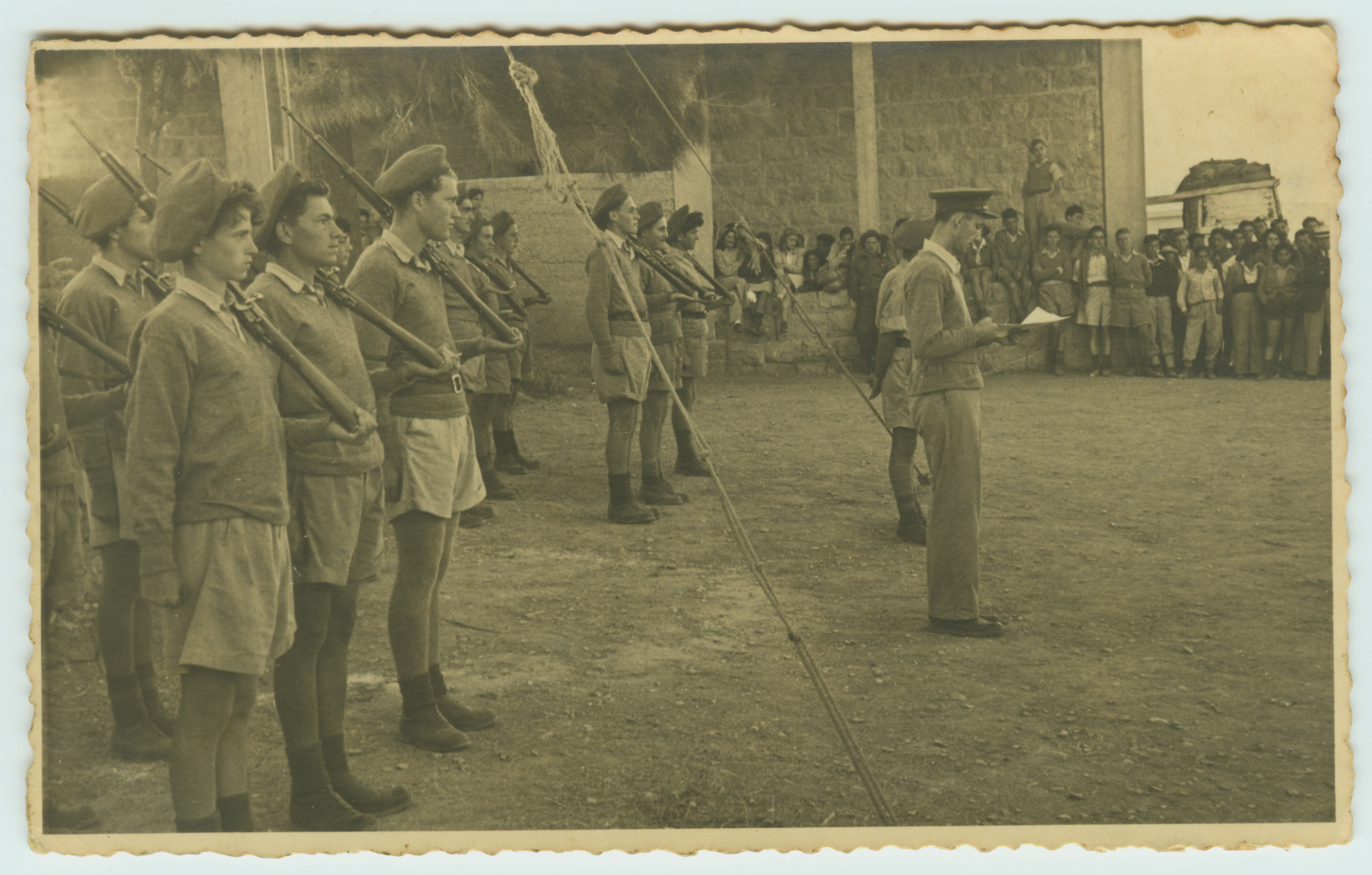 נערי הגדנ"ע בירושלים ב-1948 במסדר בבסיס הגדנ"ע בגבעת רם